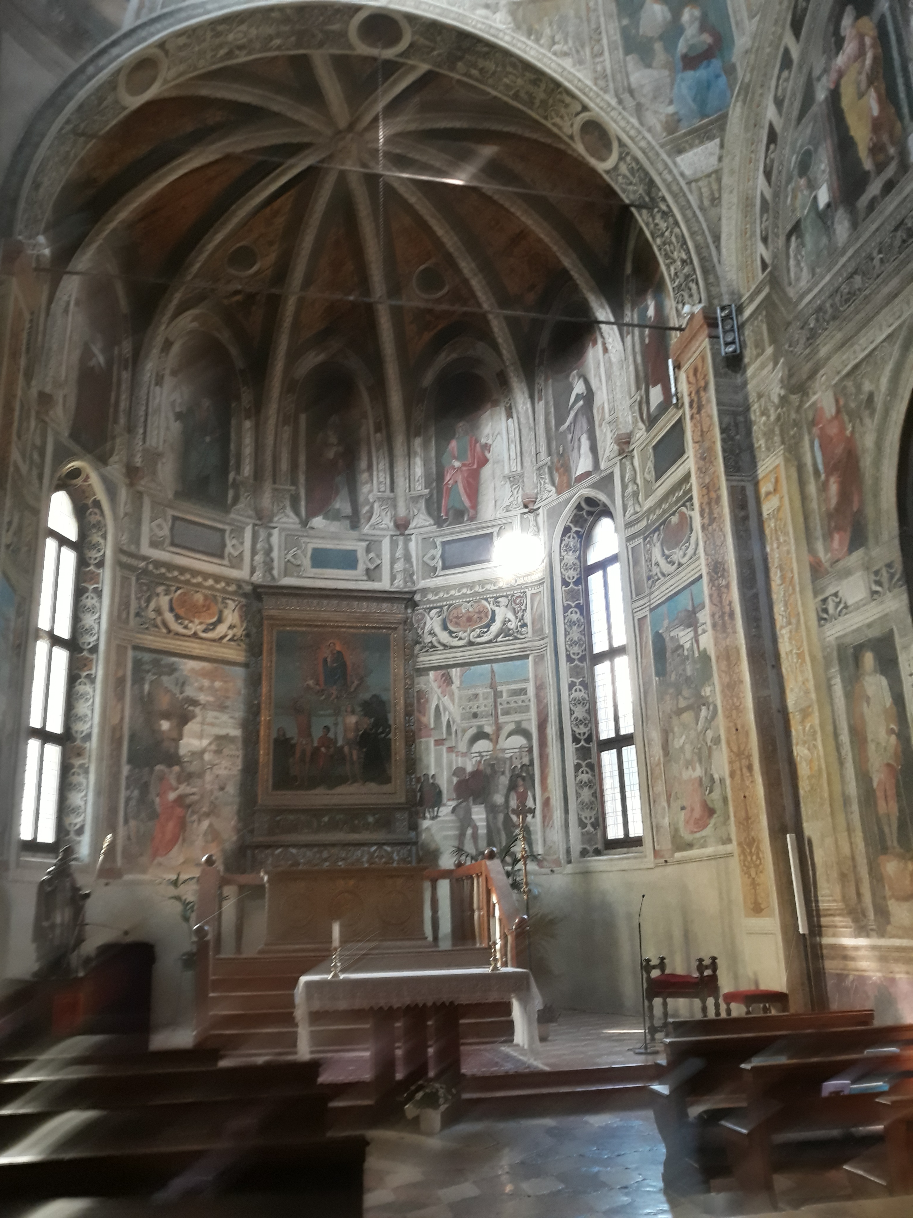 Cappella di San Biagio presso al chiesa di San Nazaro e Celso a Verona